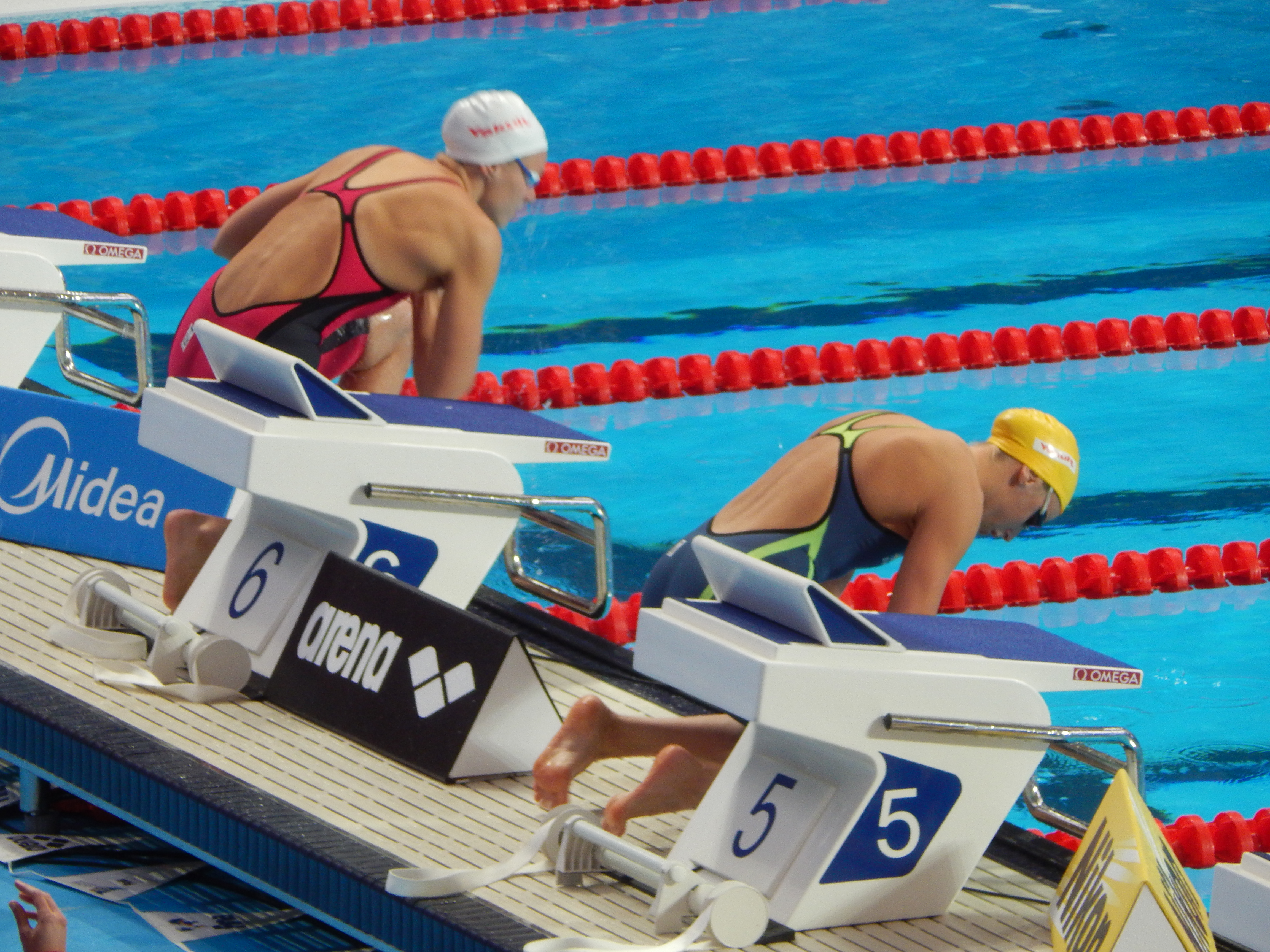 Jennie Johansson (lane 5) and Jessica Hardy (lane 4) 50m breast heats